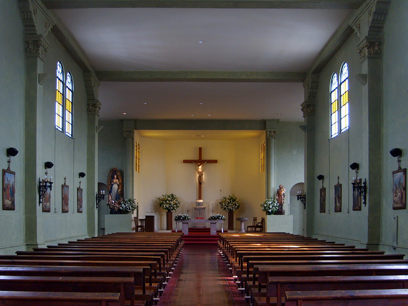 Interior de la Iglesia Inmaculada Concepción en Talagante. Provincia de Talagante, Chile.